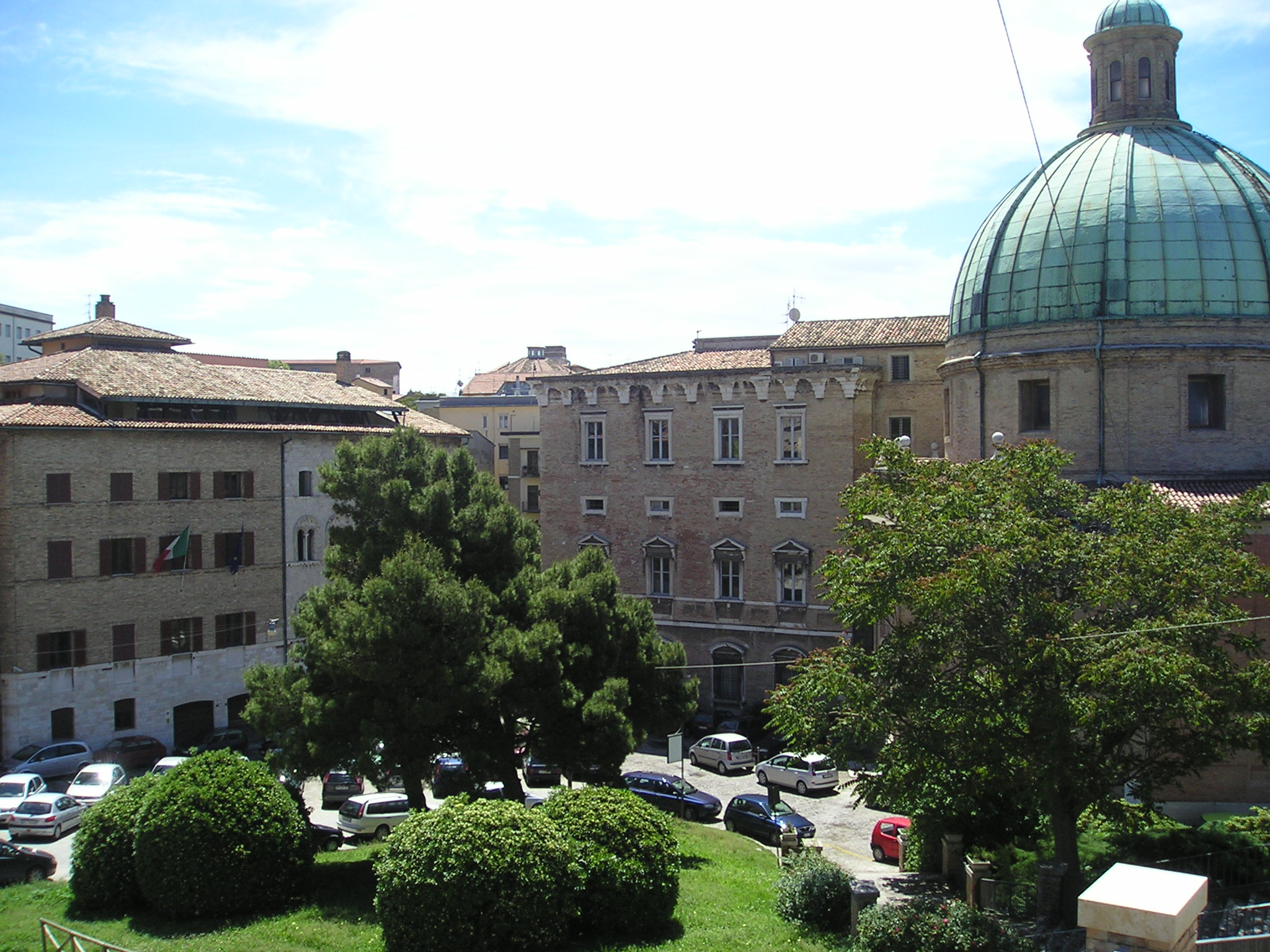 Centro di Ancona, autore Massimo Macconi (maggio 2005) Piazza del Senato, vista dal piazzale del Duomo